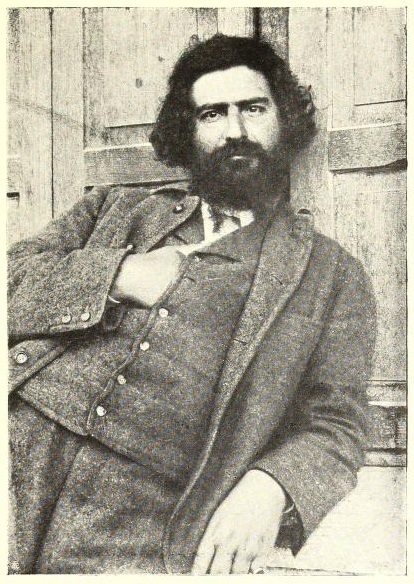 Ritratto di Giovanni Segantini